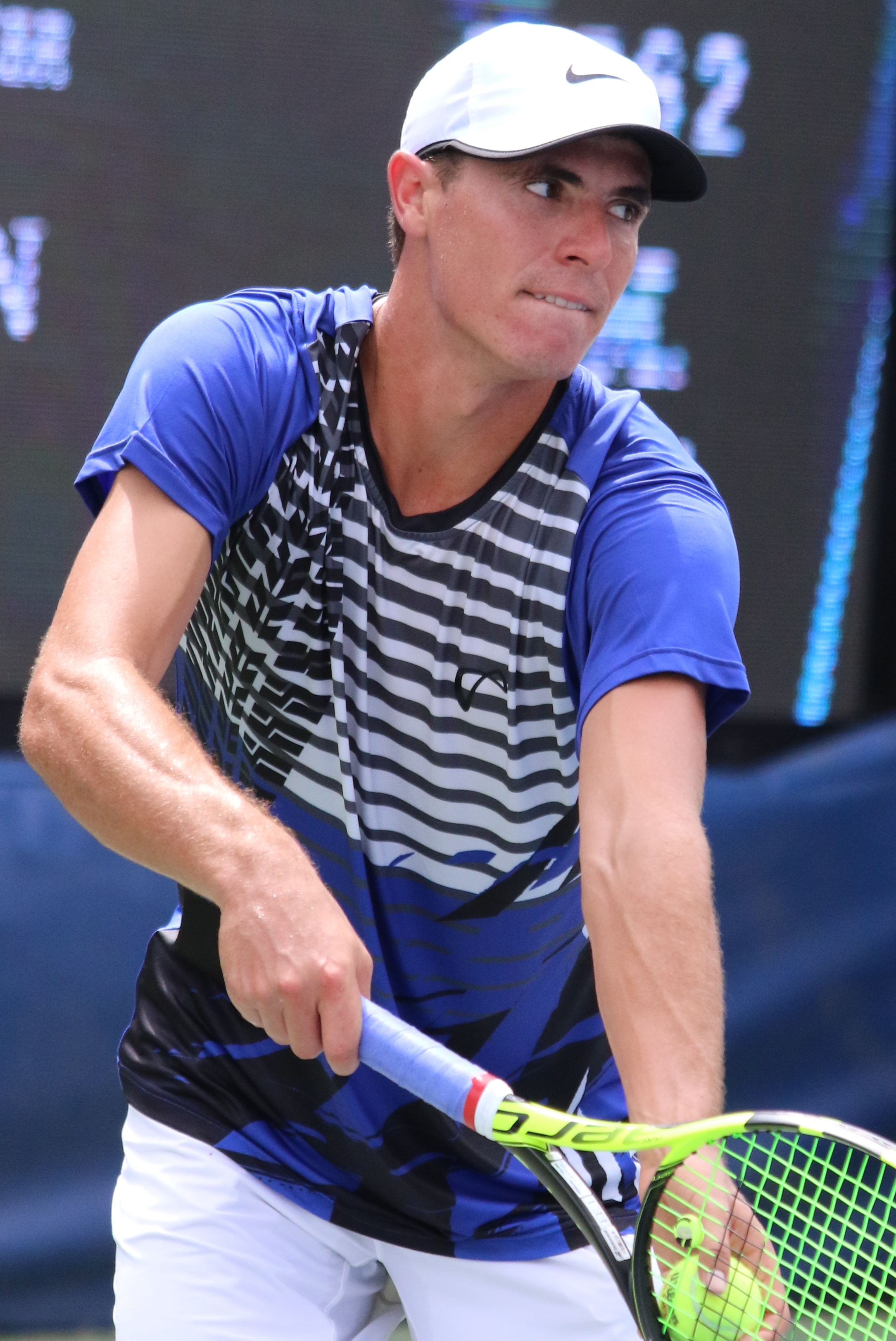 Escobedo US16 (11)